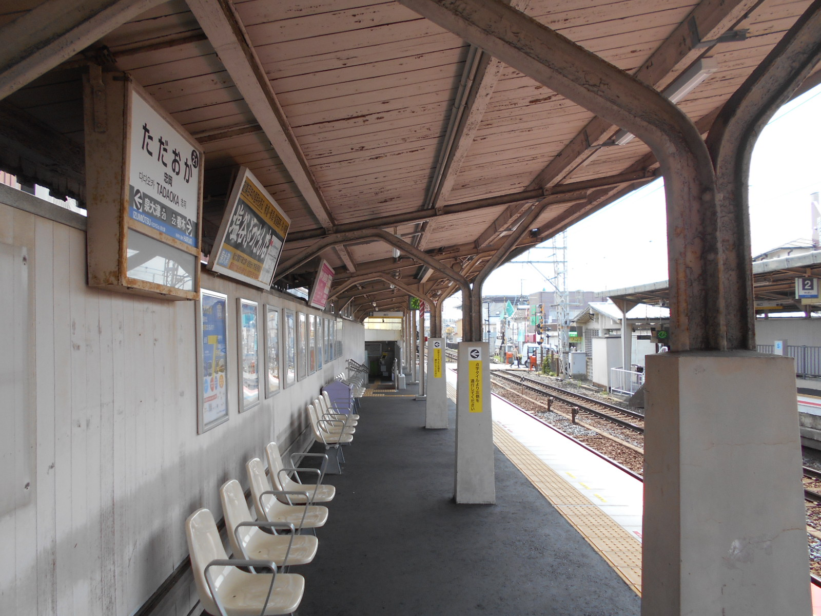 下りホーム